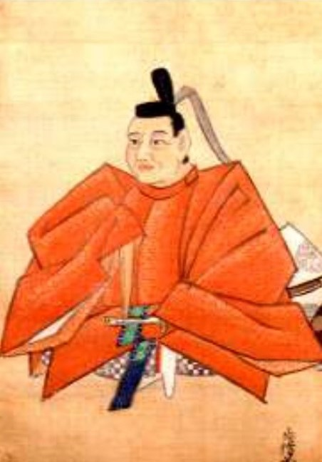 松平清昌の肖像。